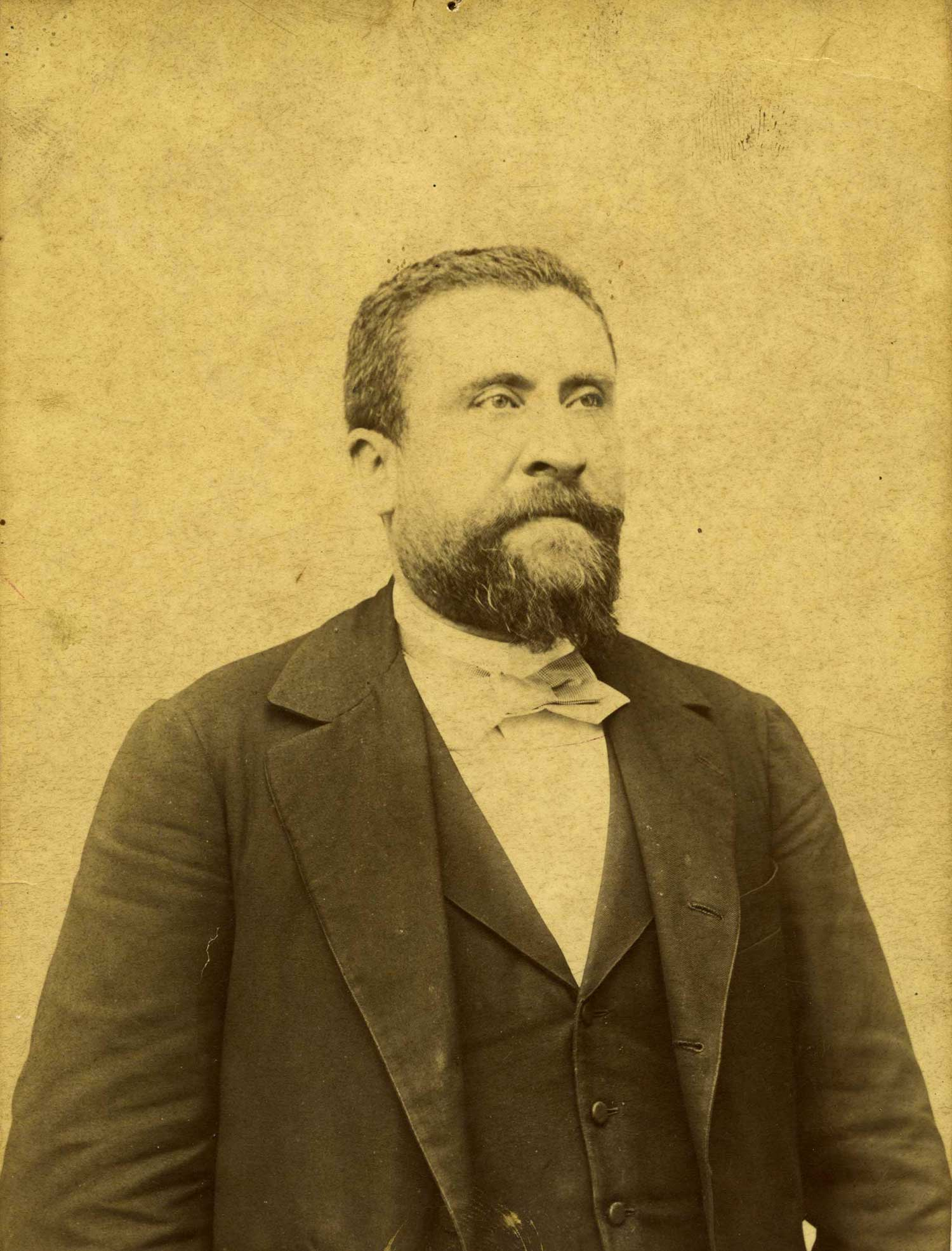 Jean Jaurès vers 1892. Studio Marc fils à Castres.